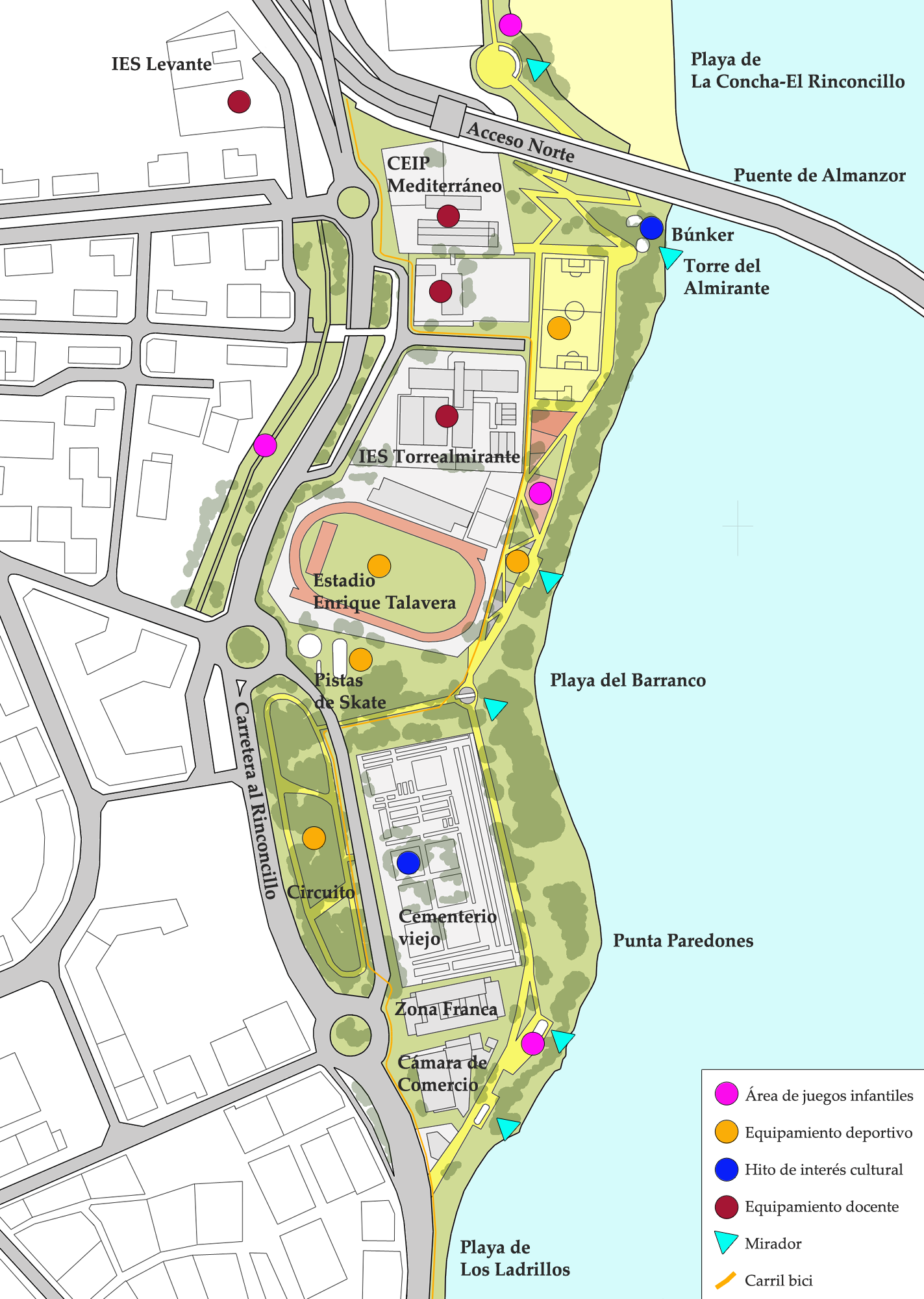 Plano situación del Paseo Cornisa de Algeciras, Andalucía, España